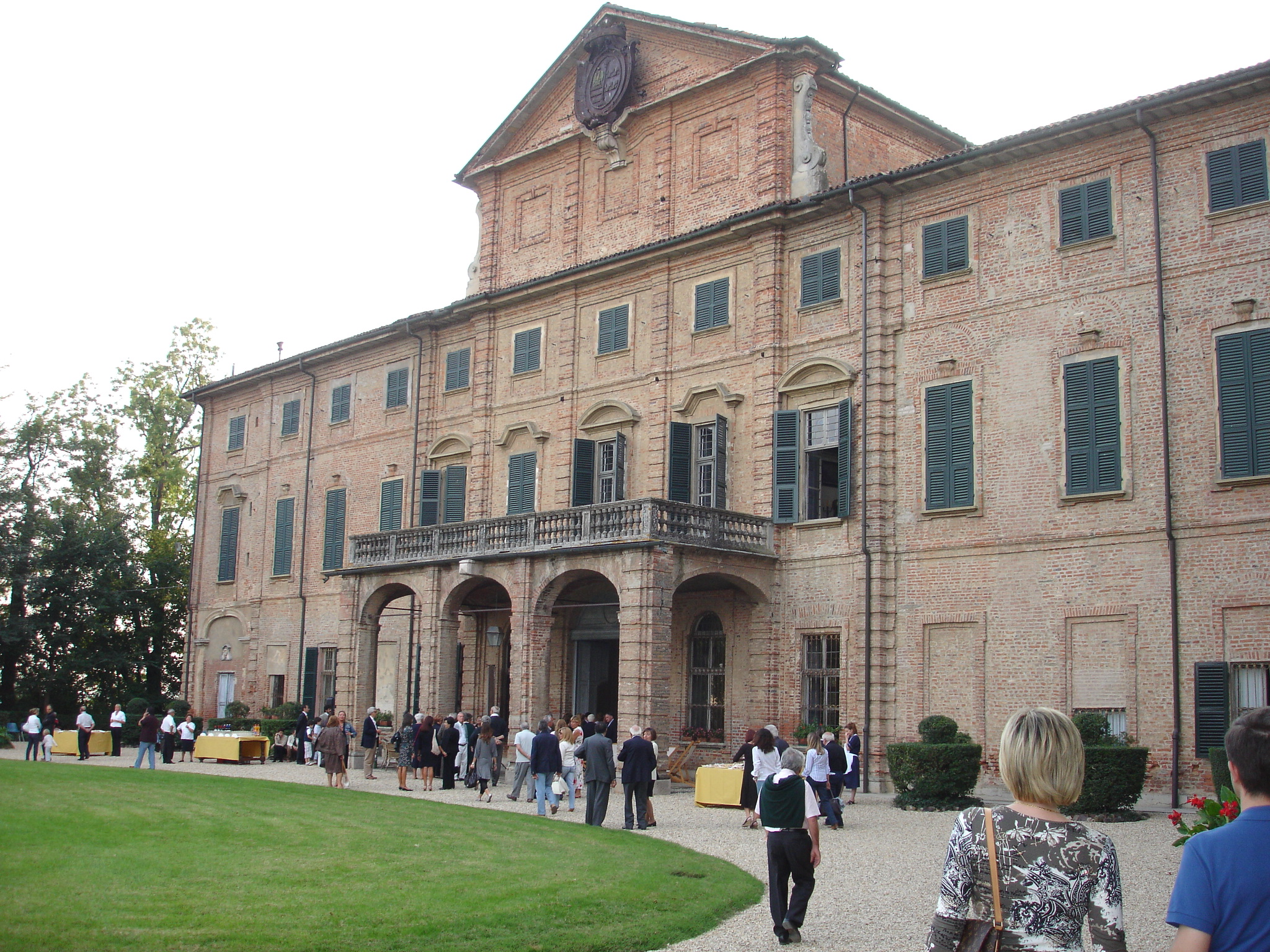 Autore: Tony Frisina. Fotografia eseguita il 22 settembre 2007 in occasione della Festa "Cento anni di nostalgia per Quargnento" nella ricorrenza del Centenario della nascita del pittore Giulio Benzi di Quargnento